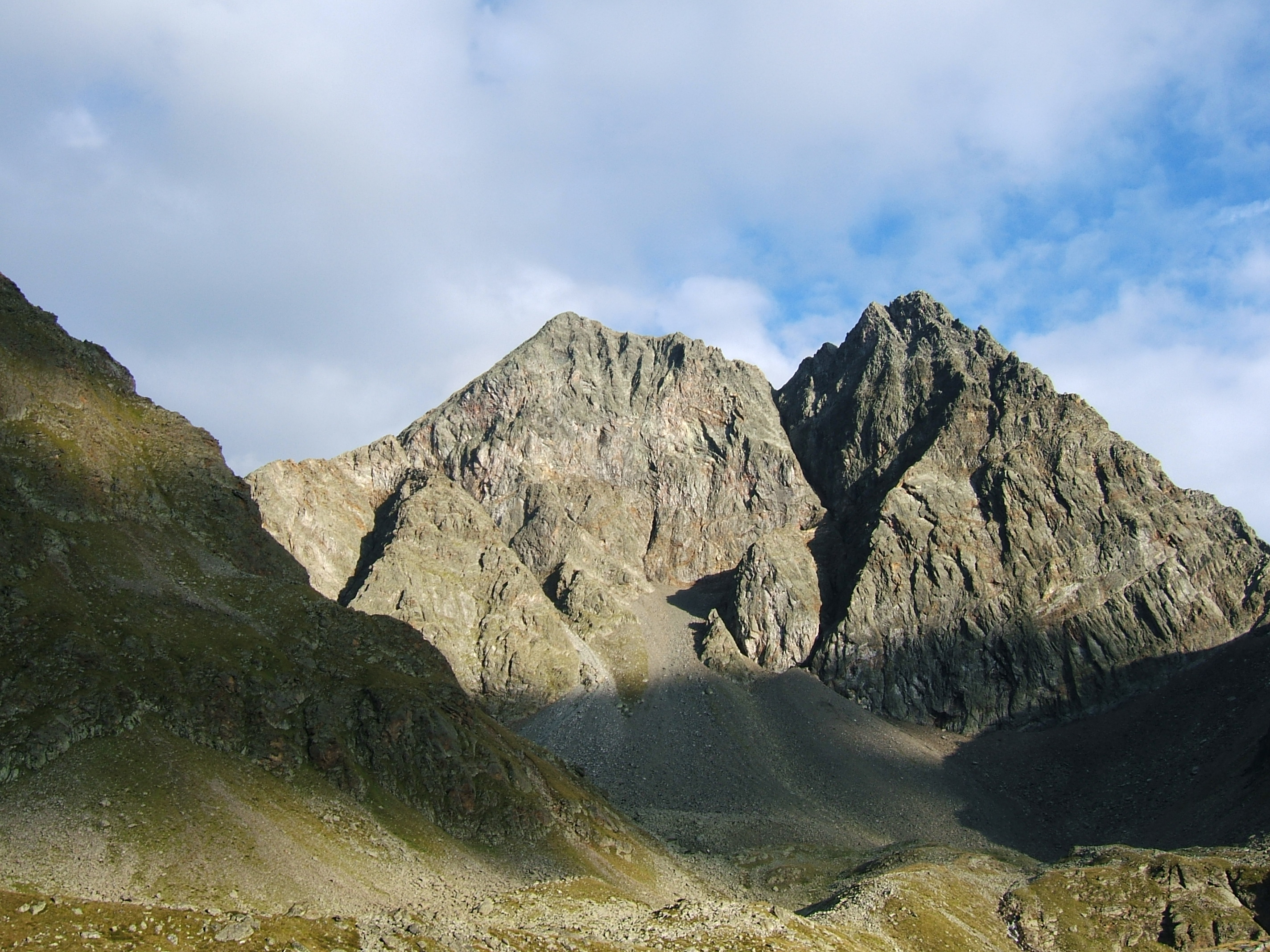 Hoher (links) und Niederer Prijakt von Norden, von der Hochschober Hütte